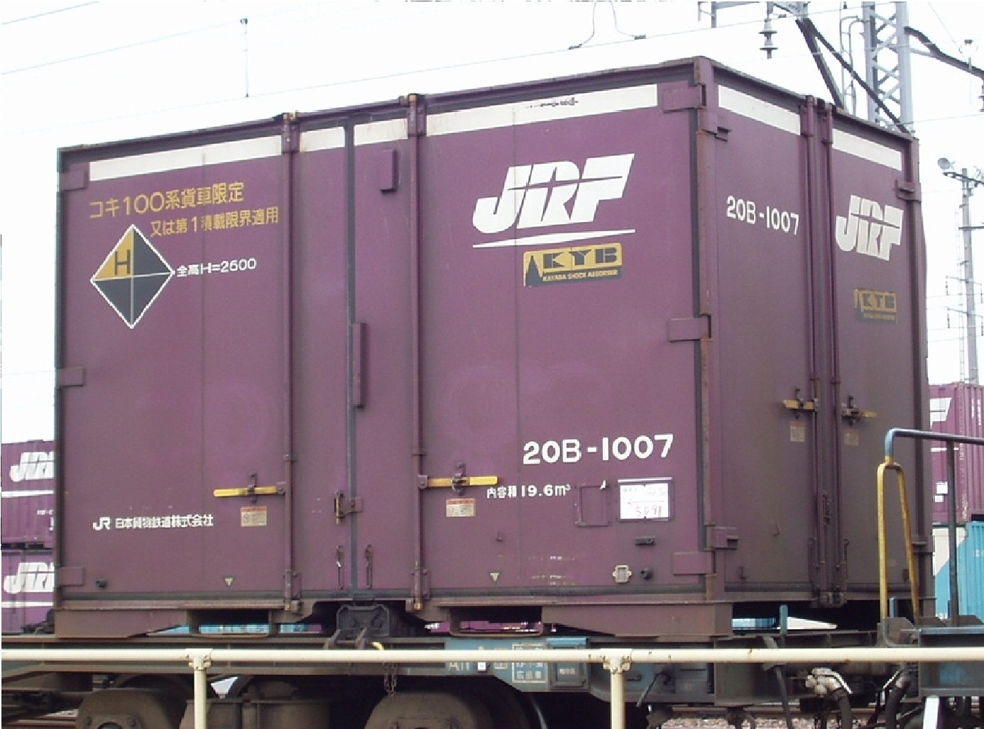 撮影地＝【岡山／旧、西岡山貨物駅】